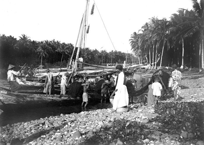 Repronegatief. Haven van Pasaoeran, Westkust Bantam, West-Java